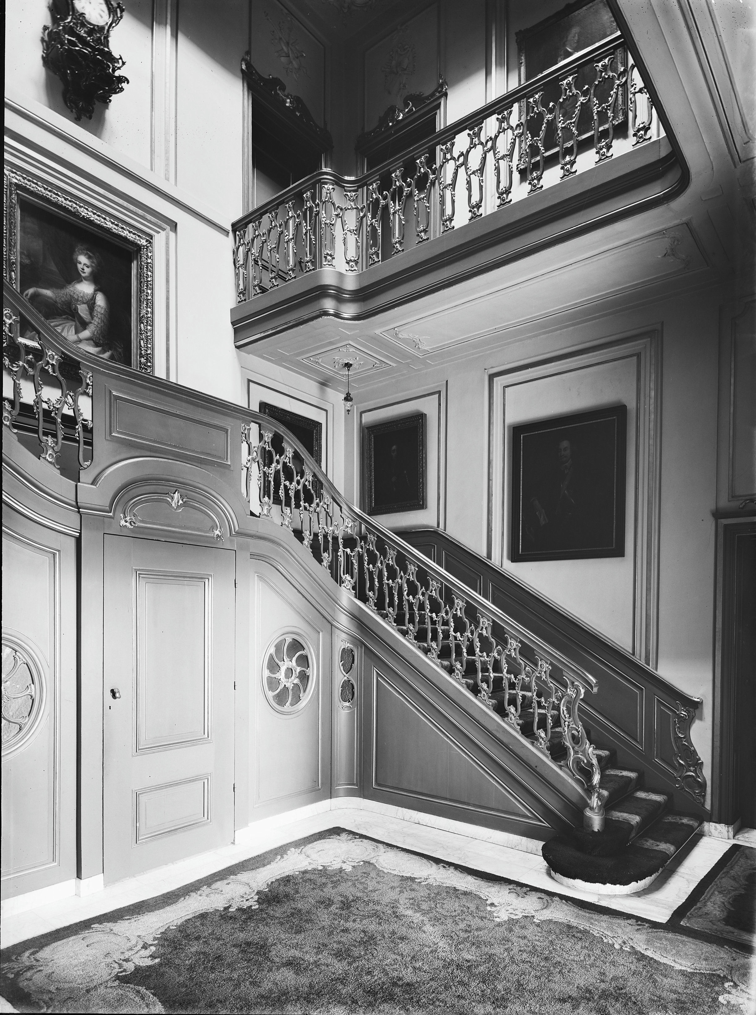 Paleis Kon.Moeder: interieur trappenhuis